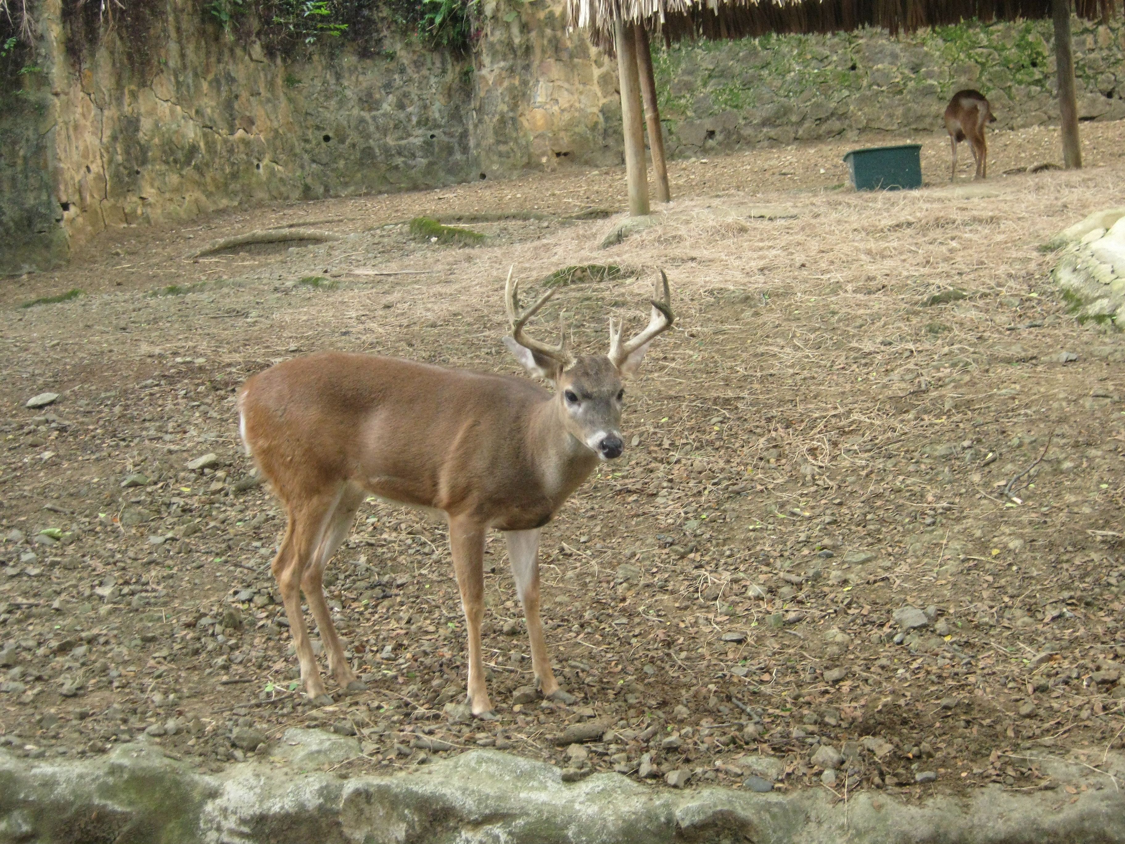 Zoológico de Cali